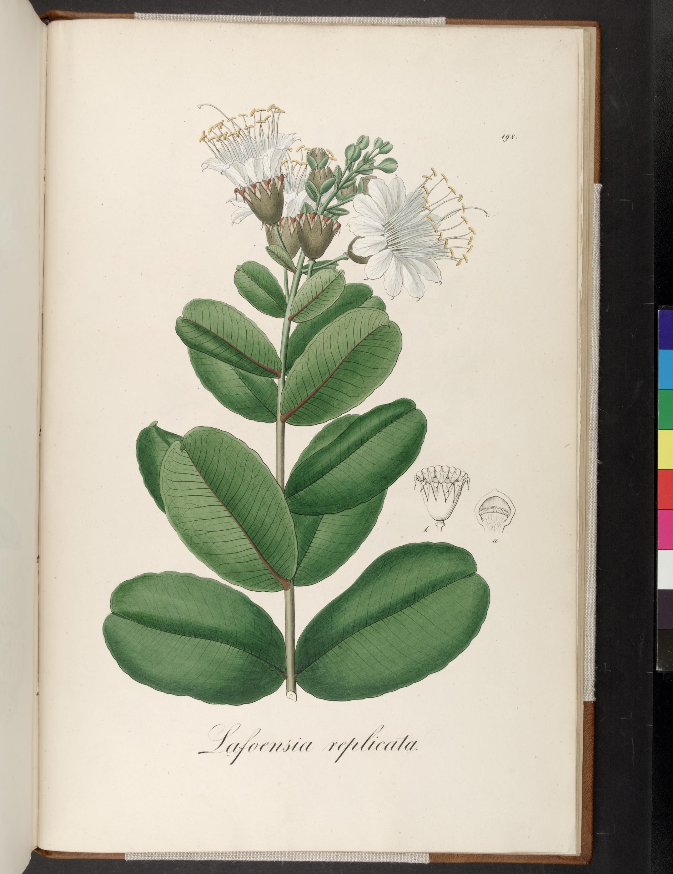 ""■"'■■'■■-■■■ ■■•1 .-■■■ ^- — -.f... ^7 avr/r//J^a /'r////rr//a. " ■ ffWW"